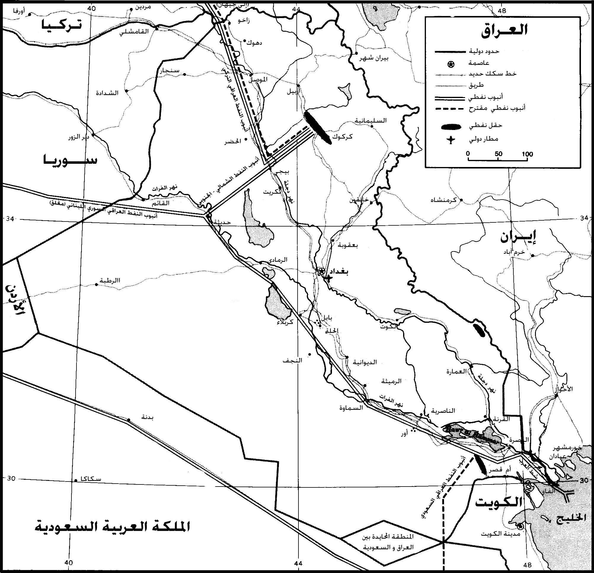 حقول وأنابيب النفط العراقية عام 1987